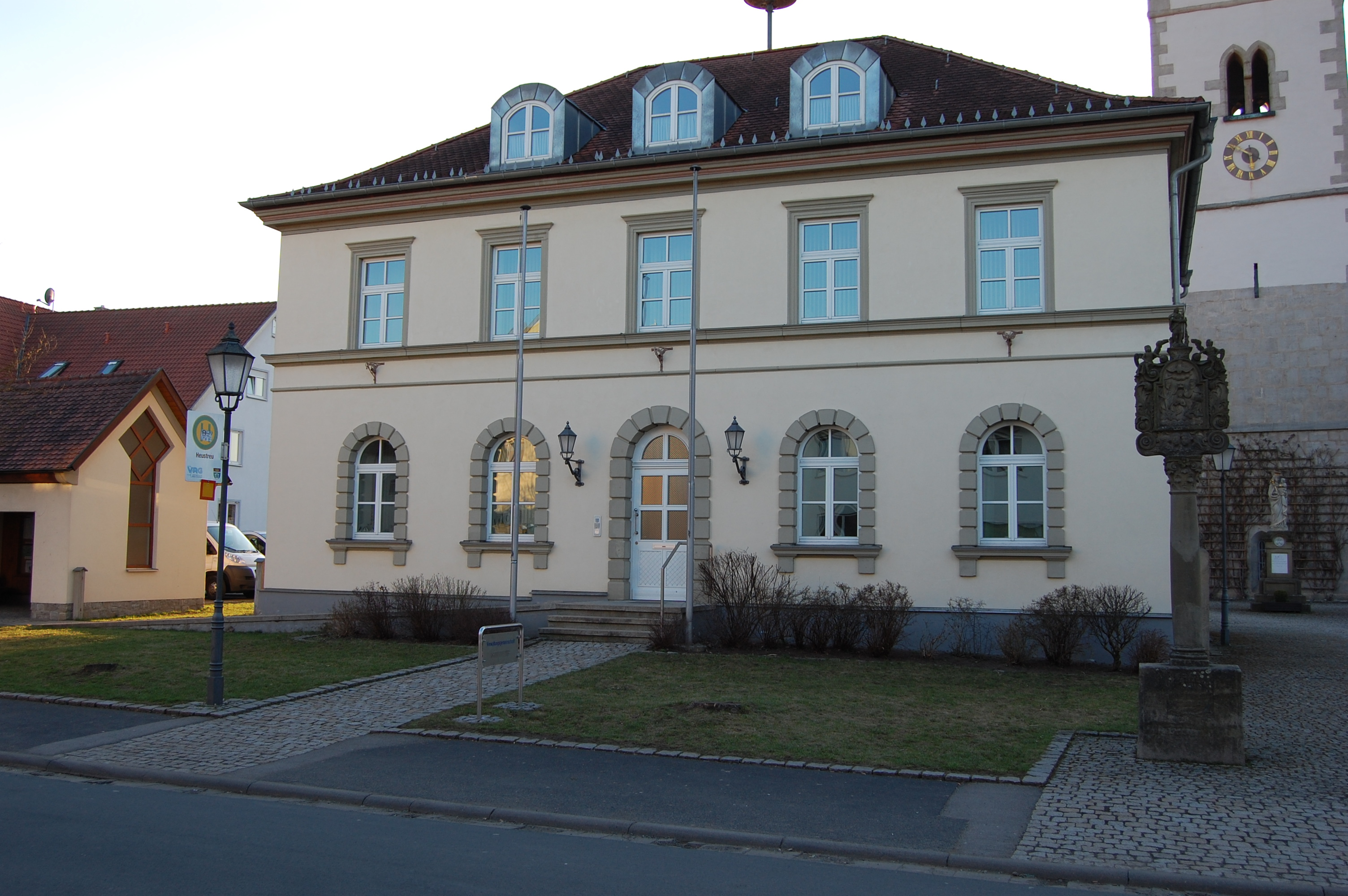 Heustreu, Kreis Rhön-Grabfeld, Verwaltungsgemeinschaft (2011)